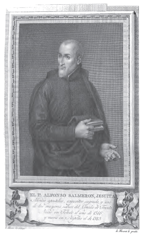 Retrato de Alfonso Salmerón.